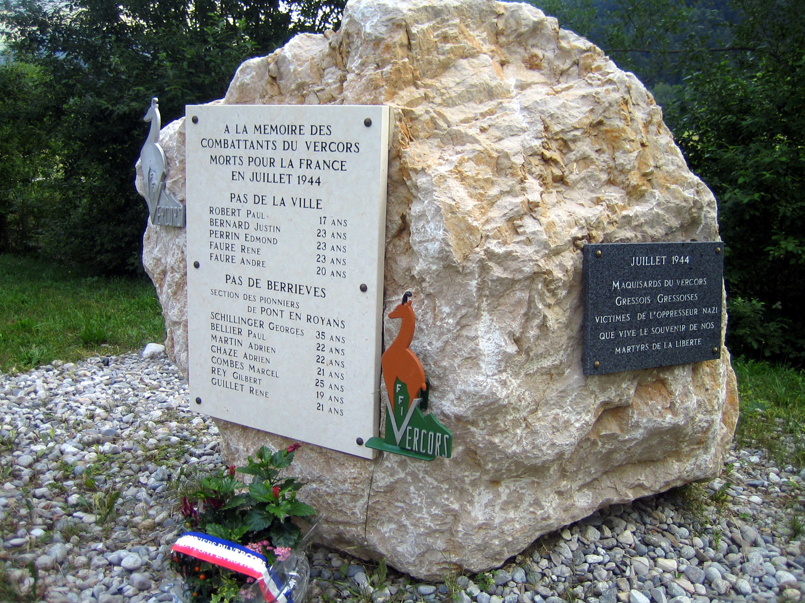 Gresse-en-Vercors (Isère, France) - Monument en hommage aux combattants du maquis tués en juillet 1944. Gresse-en-Vercors possède 2 monuments de ce type. Il s'agit ici de celui érigé face aux pistes. .